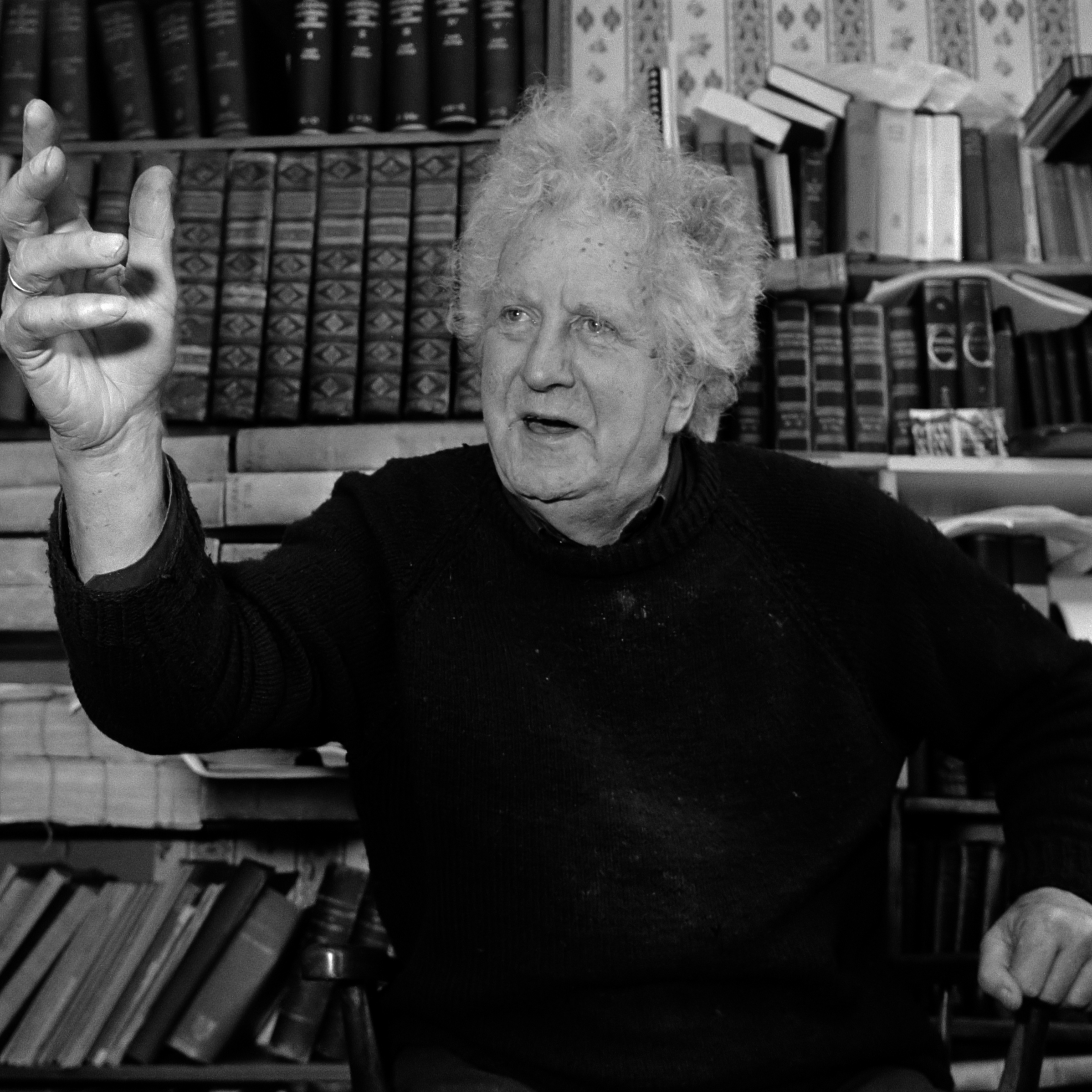 Opdracht Gelderlander; Theoloog Breukelmans 11 februari 1988